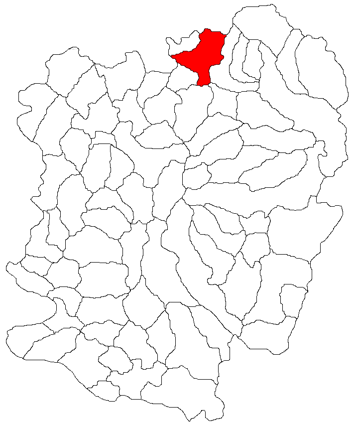 Categorie:Hărţi ale judeţului Caraş-Severin